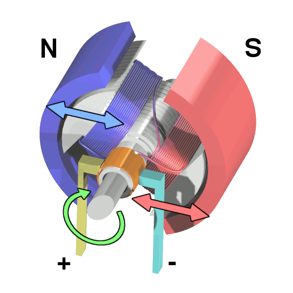 схема. Электродвигатель постоянного тока.